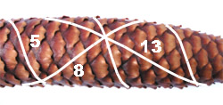 Fichtenzapfen mit 5, 8 und 13 Fibonacci-Spiralen. Fotografiert und bearbeitet von Wolfgang Beyer